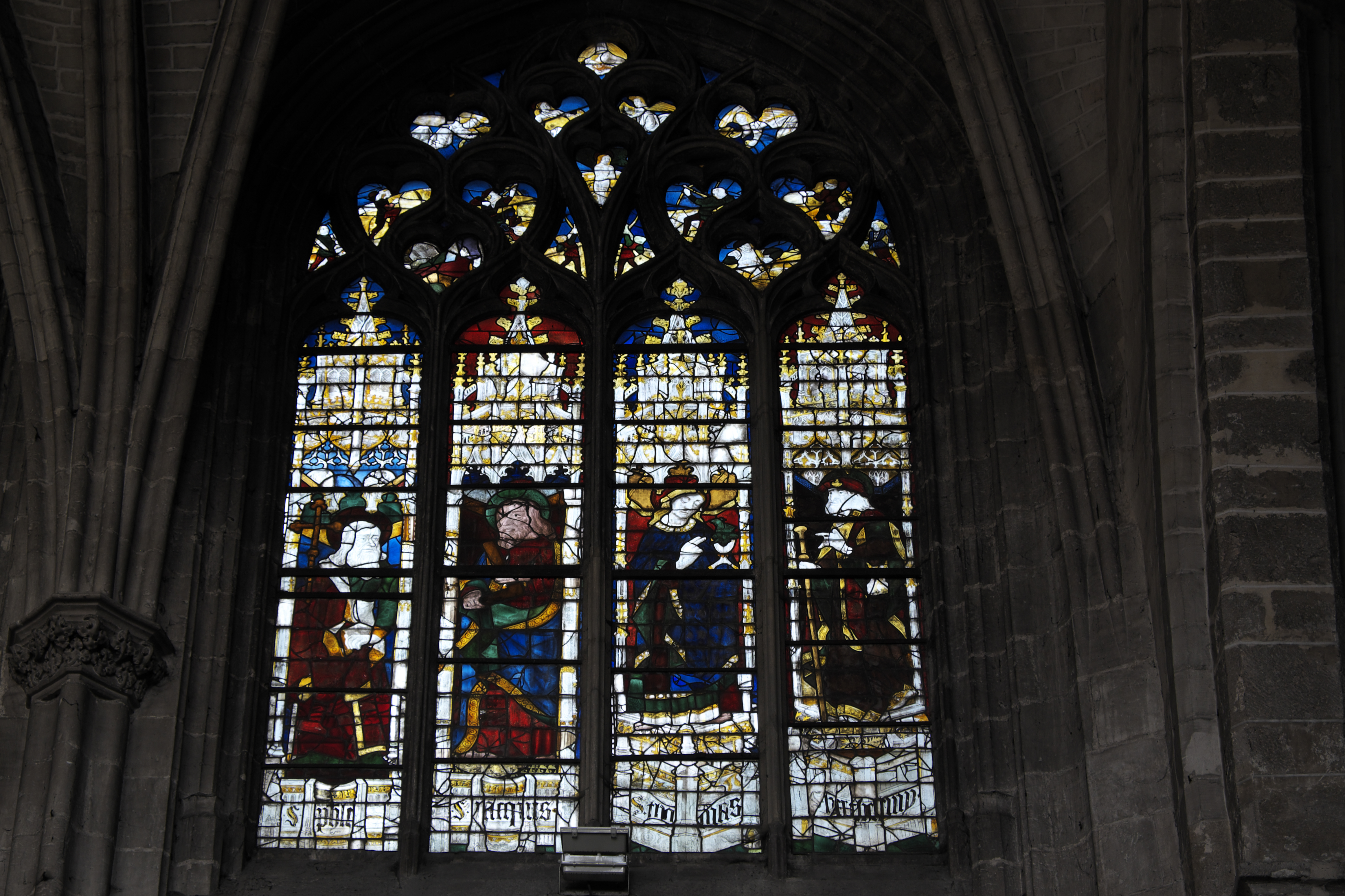 Katholische Kirche Saint-Pierre in Dreux im Département Eure-et-Loir (Centre-Val de Loire/Frankreich), Bleiglasfenster aus der zweiten Hälfte des 15. Jahrhunderts, Darstellung: Apostel